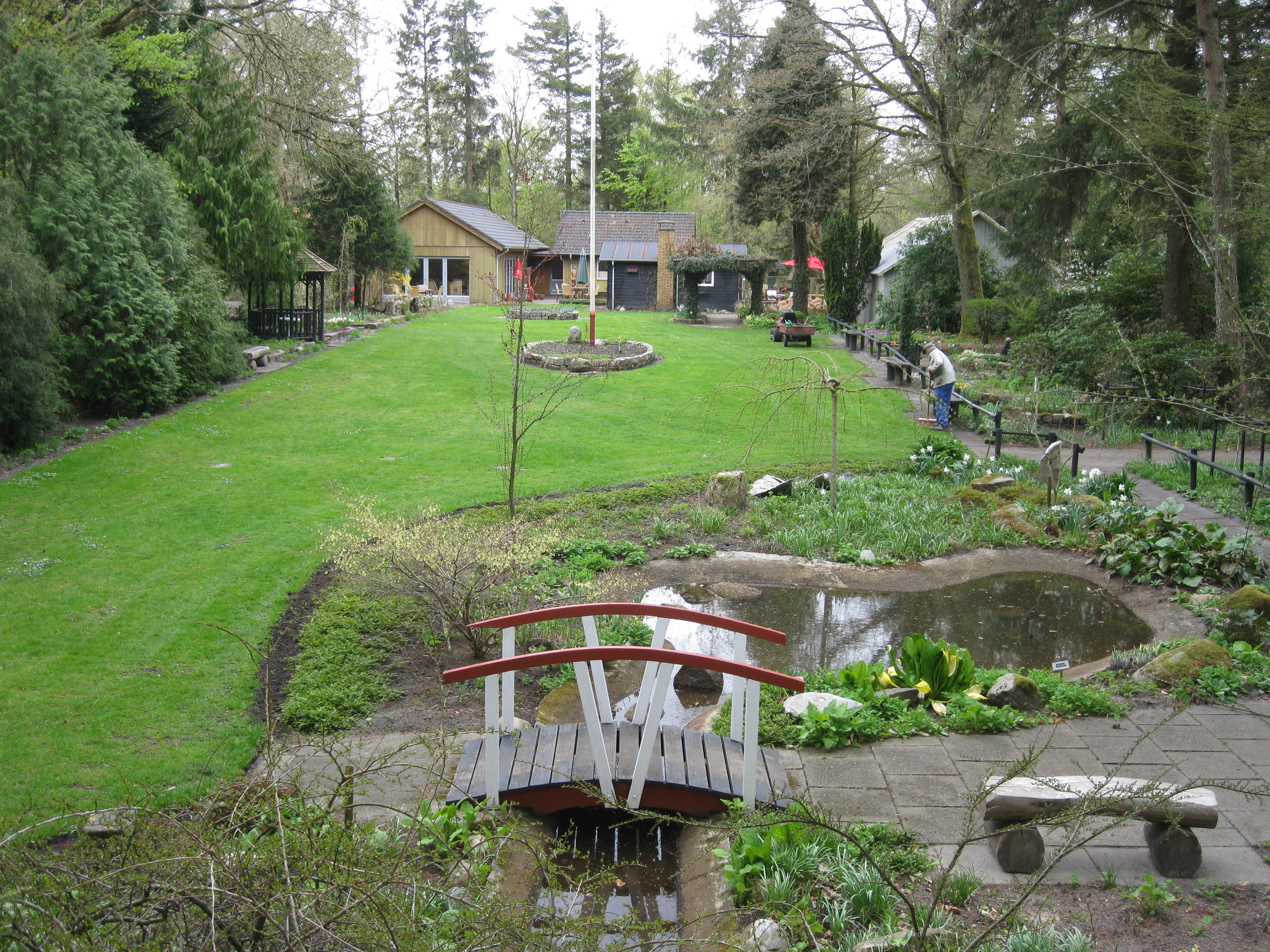 Tambours Have ved Karlsgårde Sø